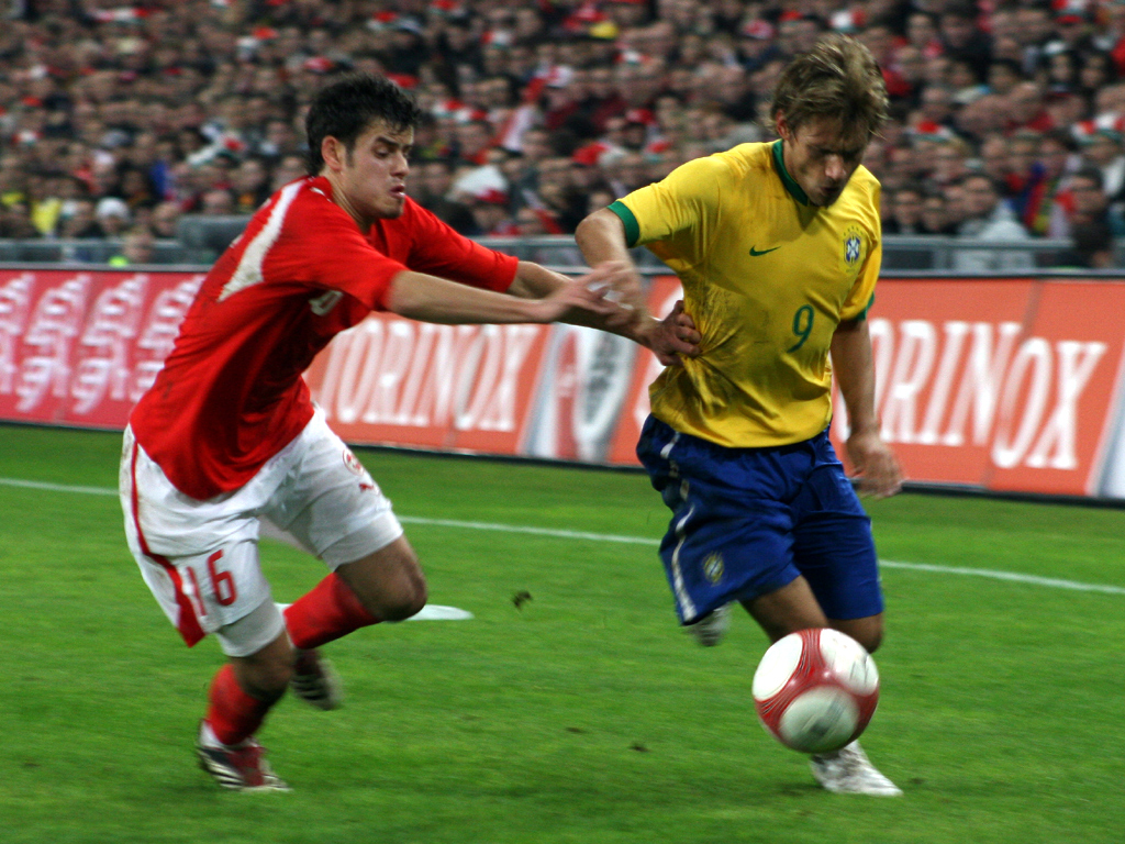 Tranquillo, St. Jakob Stadion, Basel (Switzerland), Switzerland - Brasil 1:2